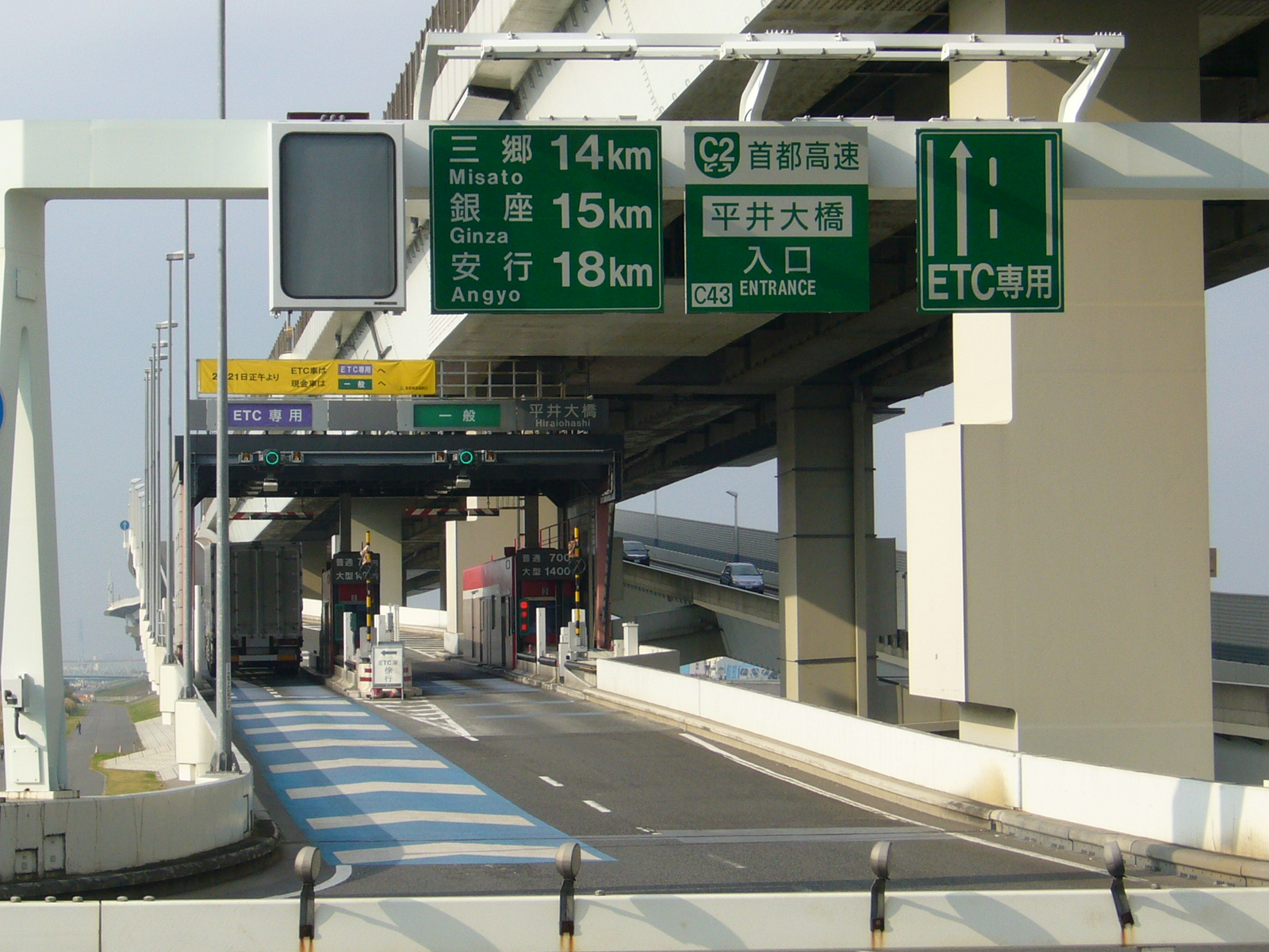 hirai-ohashi-I.C.,katsushika-city,japan